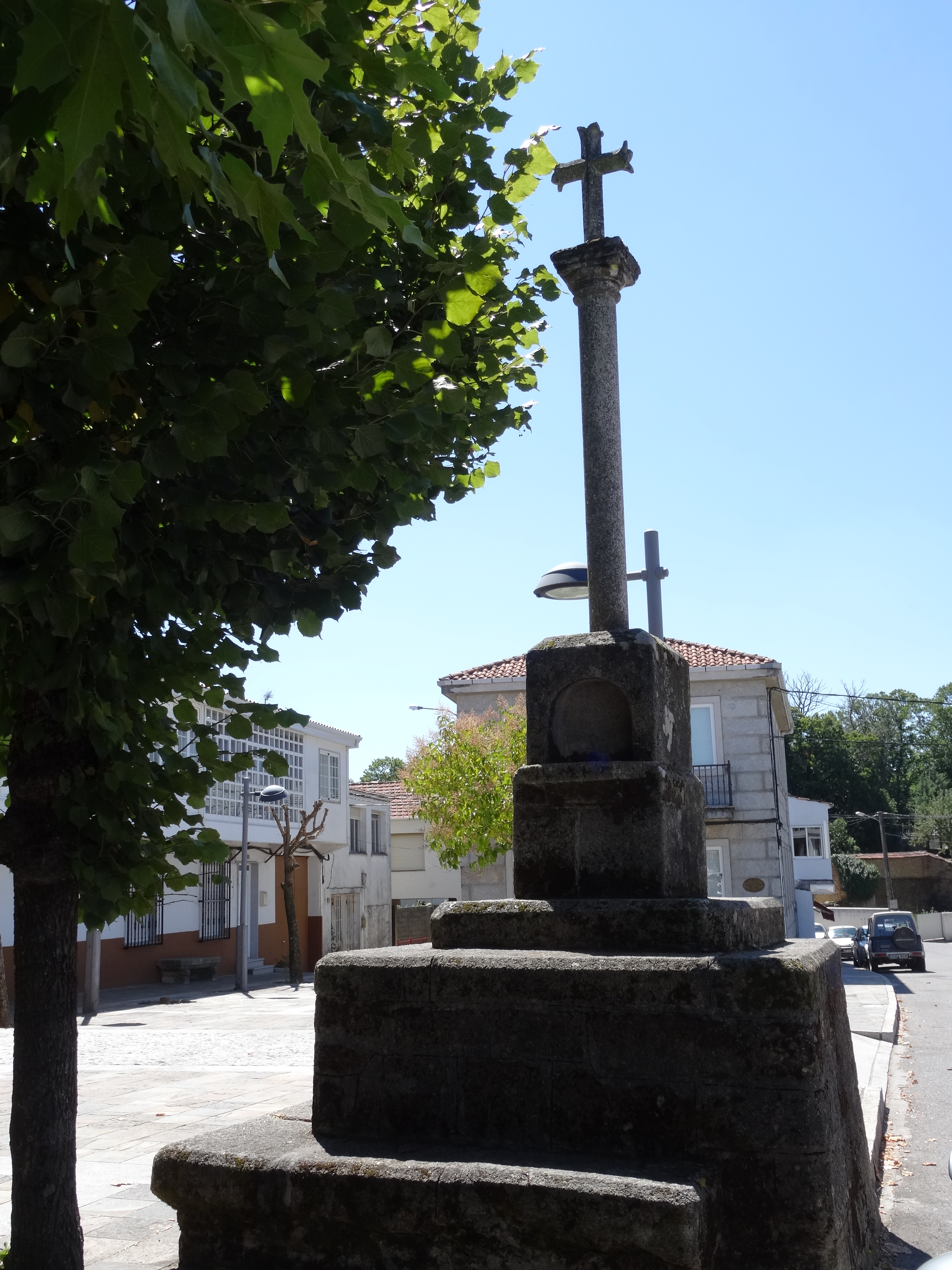 Cruceiro no concello de Riós, Ourense.